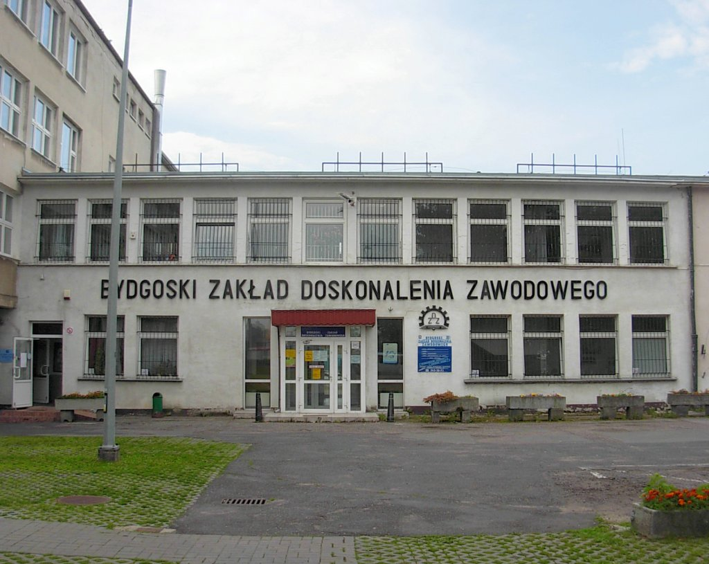 Budynek w którym znajduje się Bydgoski Zakład Doskonalenia Zawodowego oraz Wyższa Szkoła Środowiska w Bydgoszczy